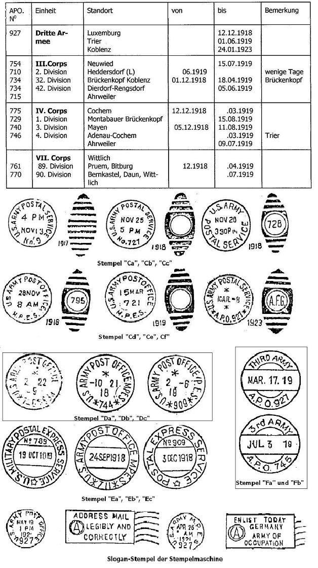 Amerikanische Feldpostämter und ihre Stempel 1918 - 1923 eigenbau W.Steven 12:15, 23. Jan. 2007 (CET) 2007